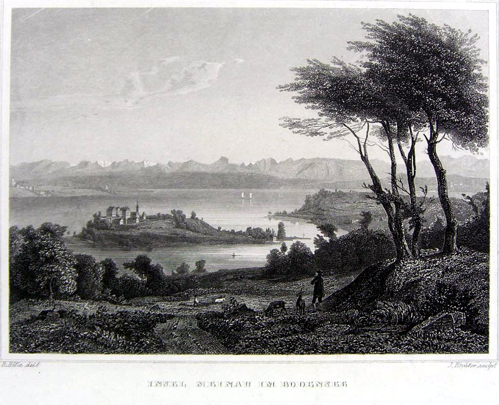 Insel Mainau, Stich, 19. Jh.